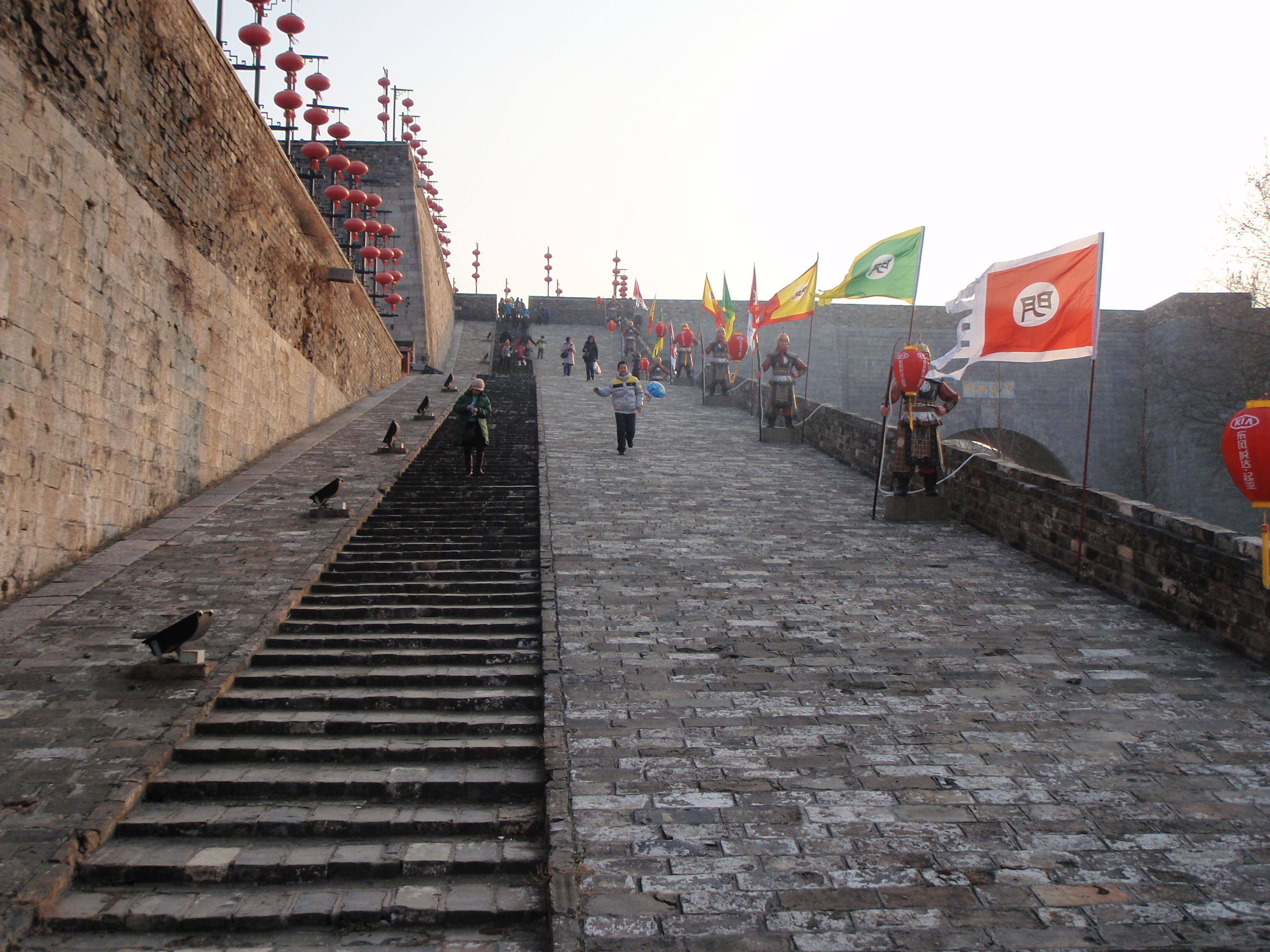 中华门城墙上